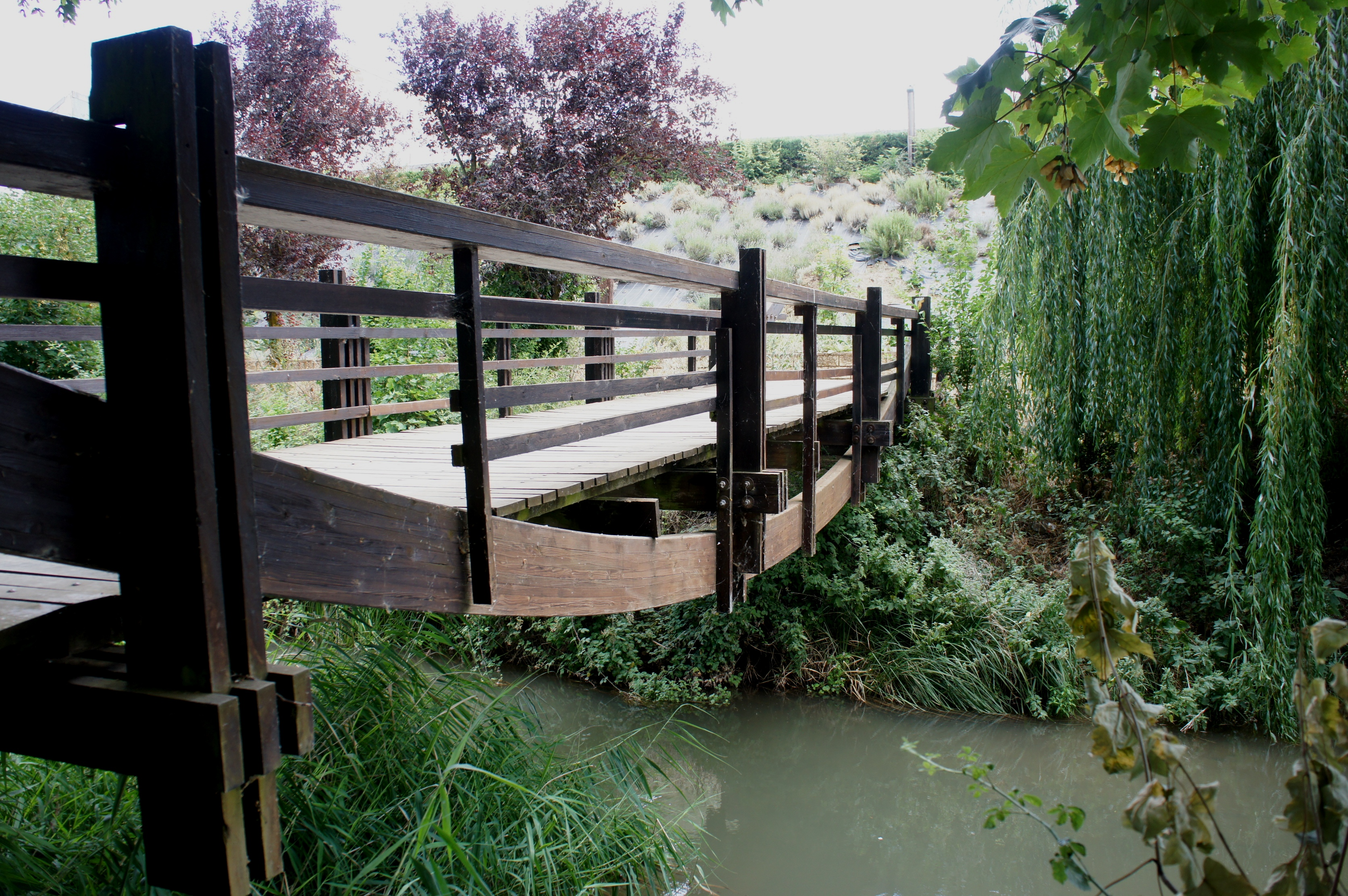 Pasarela de madera